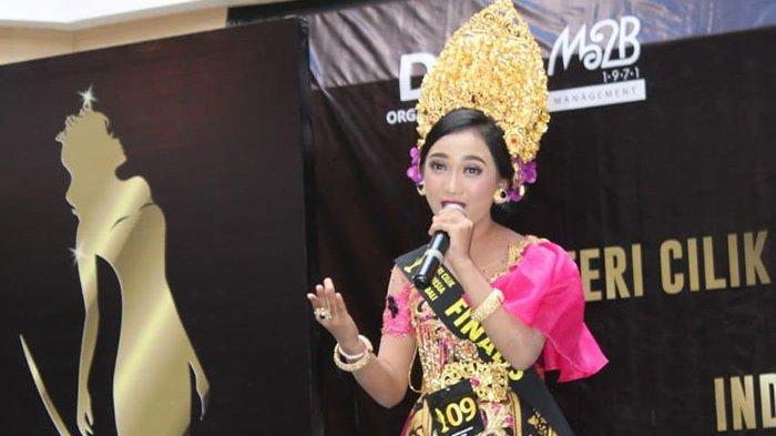 Gung mas saat meraih juara